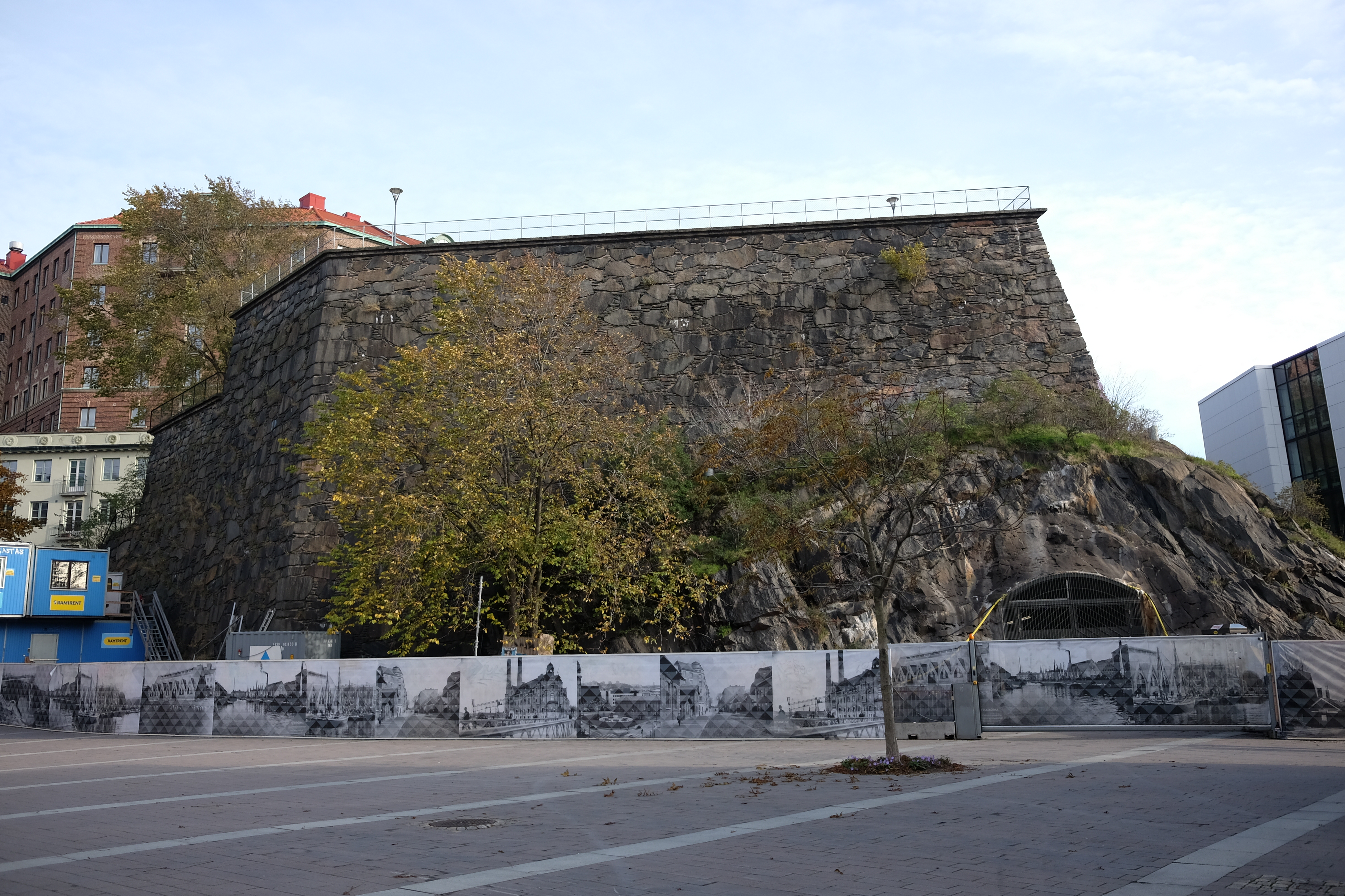 Carolus Rex, Inom Vallgraven, Göteborg.